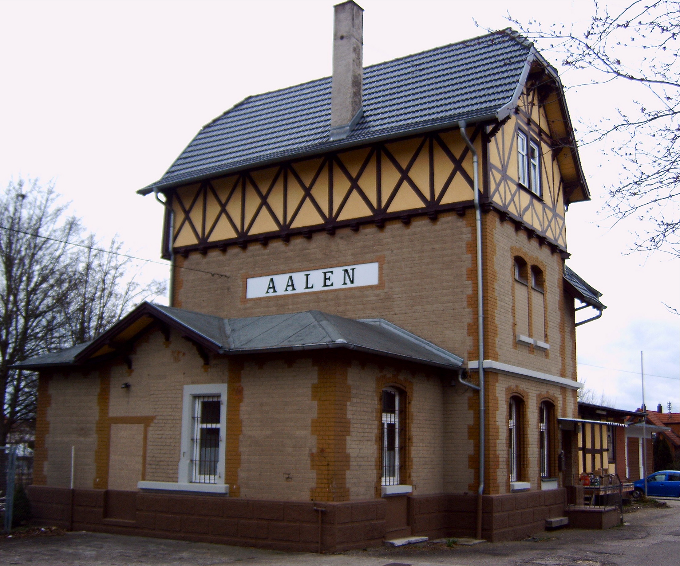 Aalen „Härtsfeldbahnhof“ (Güterbahnhof der ehemaligen Härtsfeldbahn)